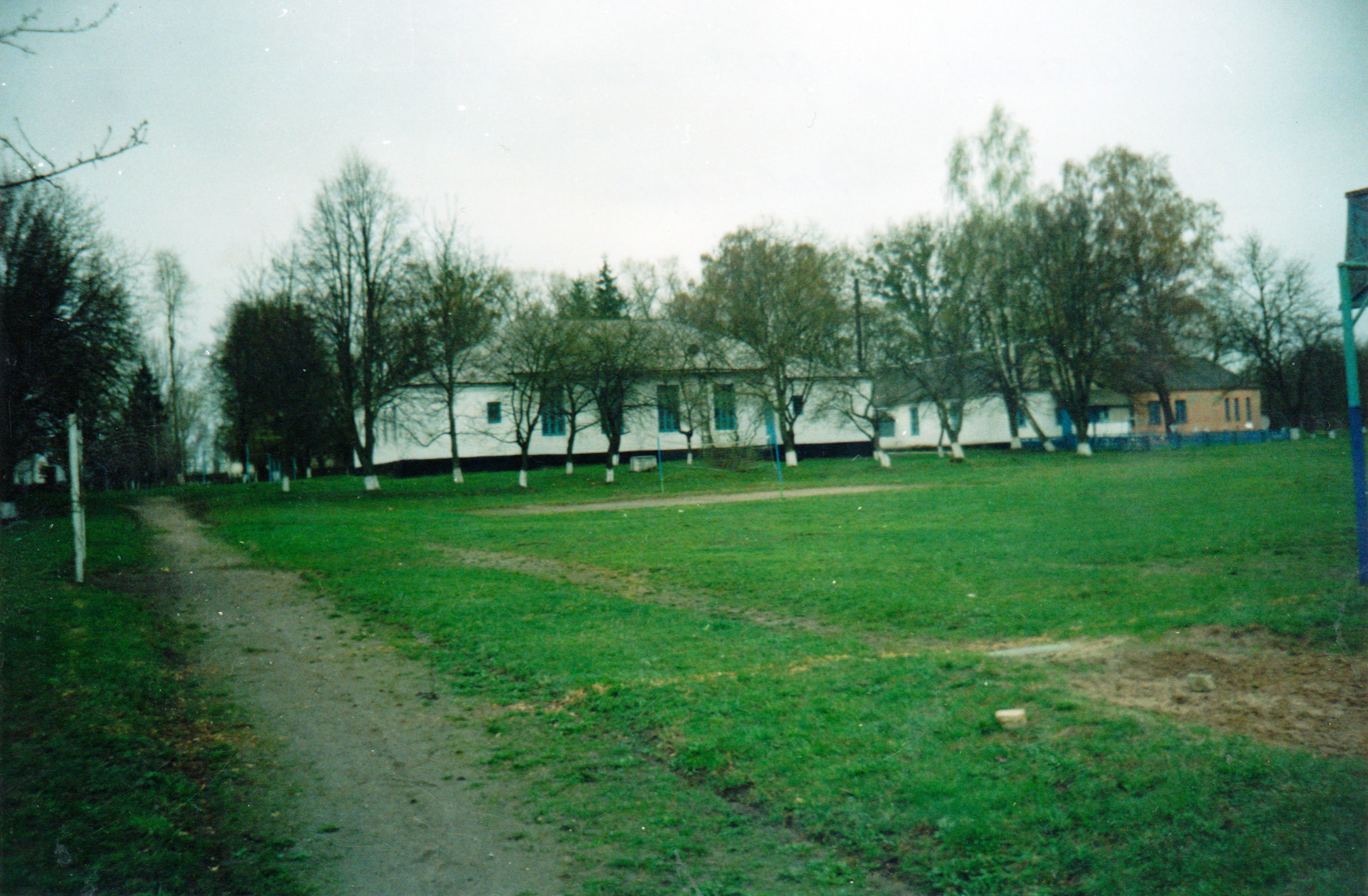 Школа с. Рисвянка у минулому "дом людовій"